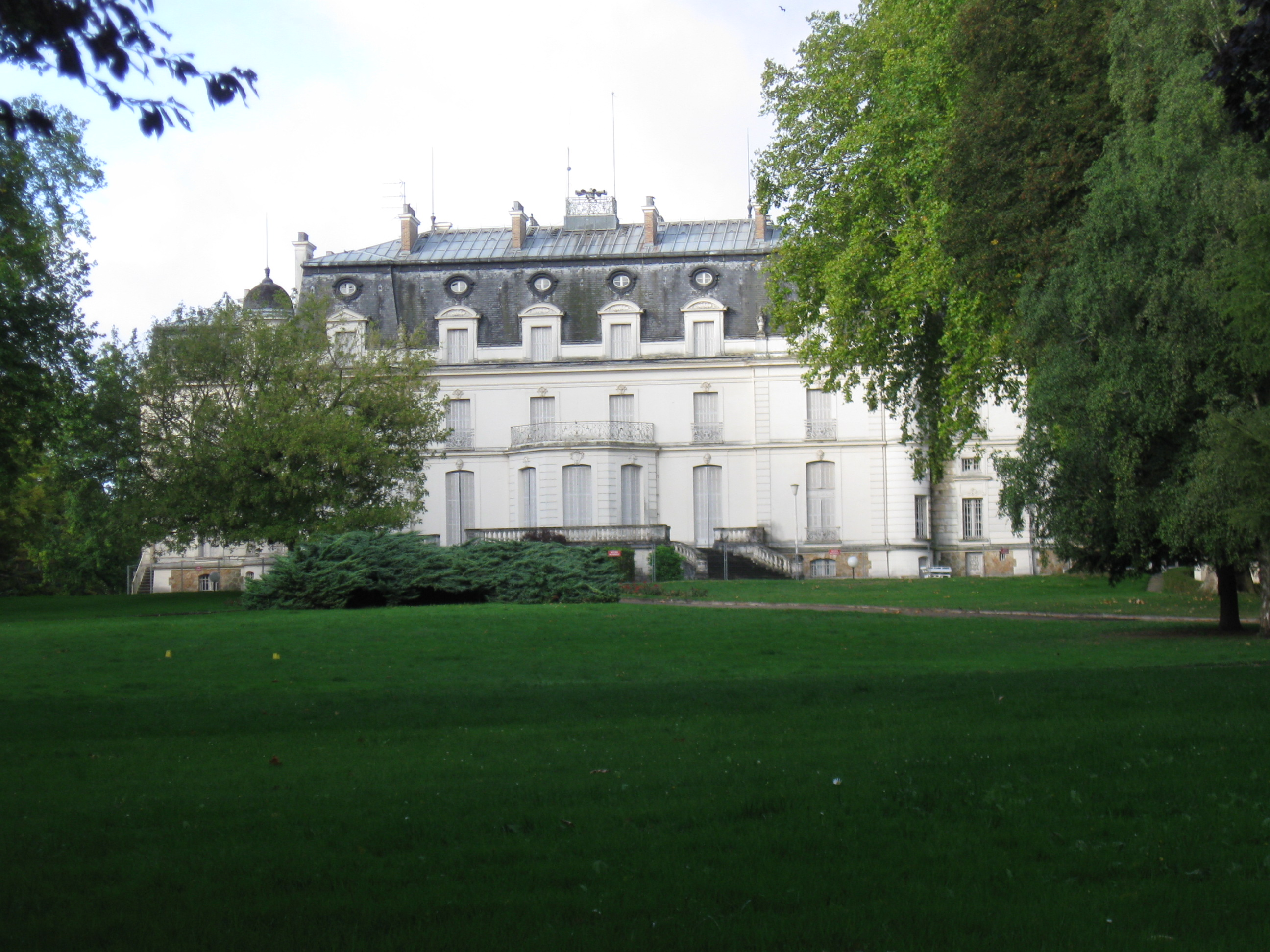 Château de Gurcy-le-Châtel. (Seine-et-Marne, région Île-de-France).